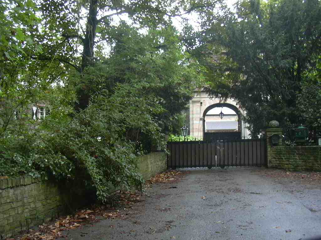 Gladbach (Vettweiß) Burgeinfahrt